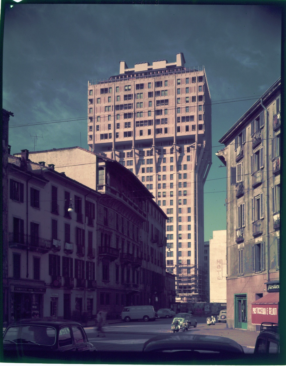 Servizio fotografico : Milano, 1960 / Paolo Monti. - Buste: 1, Fototipi: 1 : Diapositiva, sviluppo cromogeno/ pellicola ; 10x12. - ((La suddetta serie è contenuta nella scatola identificata con la numerazione GC471/620.